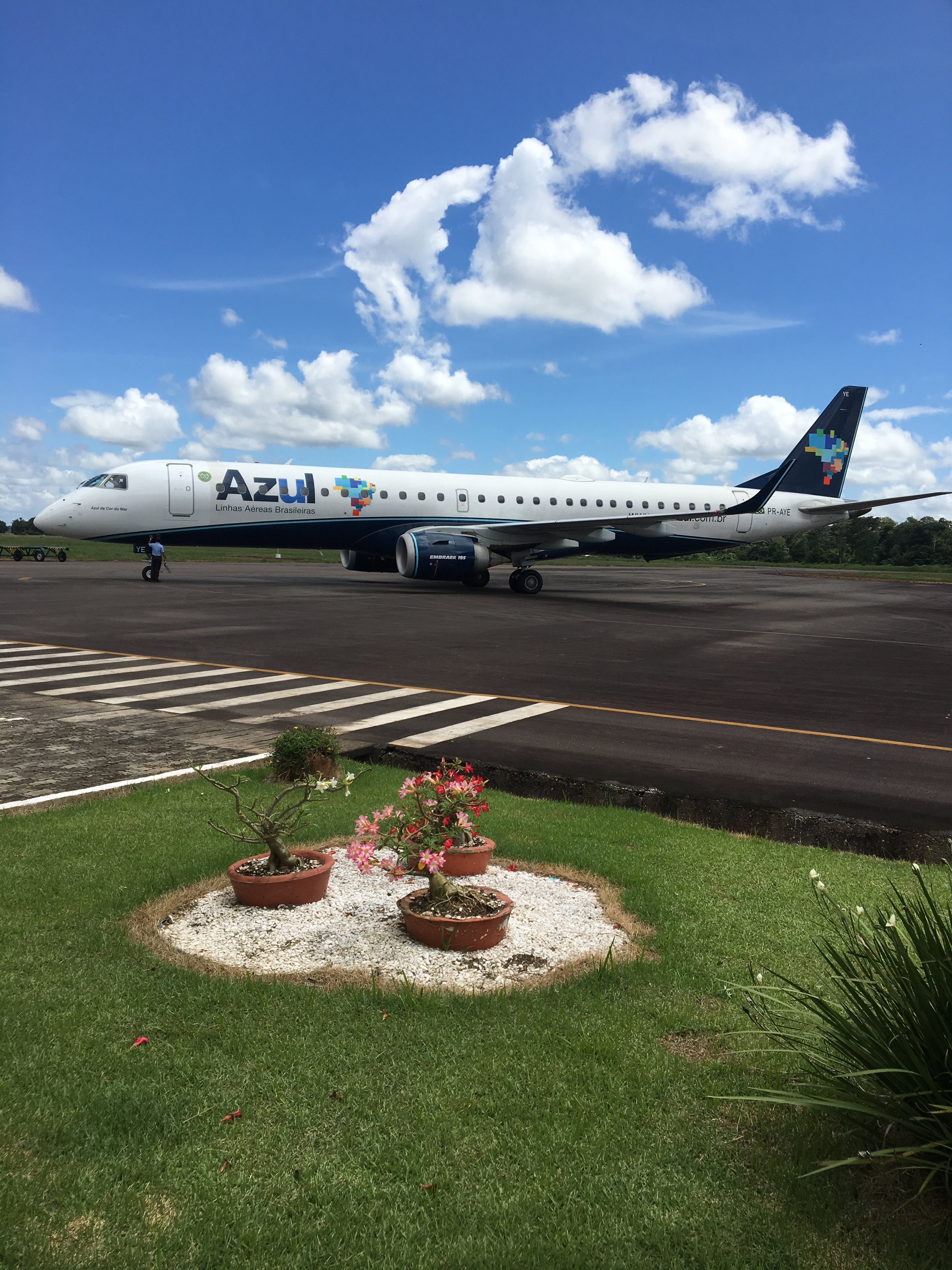 Aeronave no Aeroporto de Cacoal - Capital do Café, em Rondônia